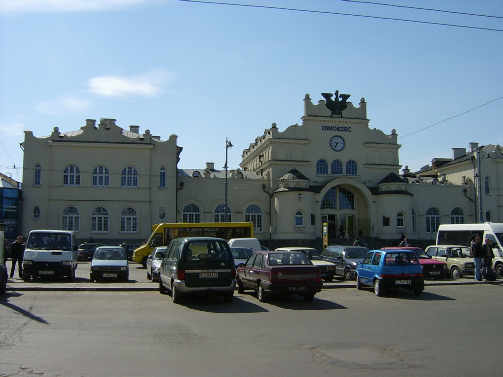 Lublin főpályaudvara (Lengyelország)